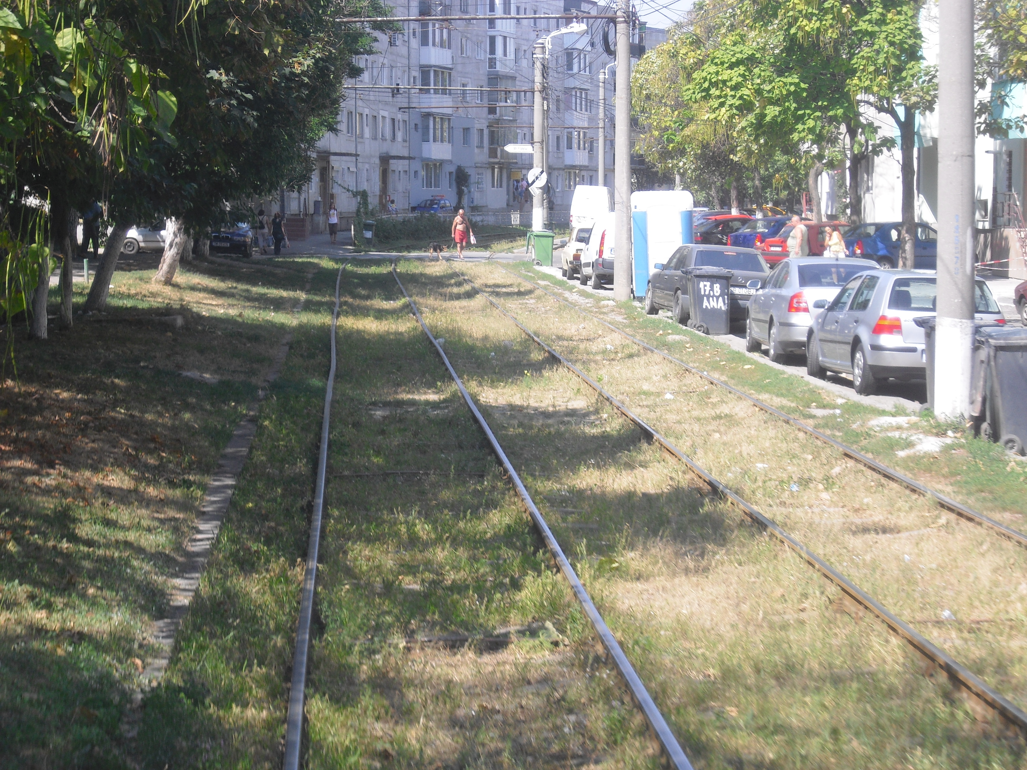 Straßenbahn in Timişoara (Rumänien)